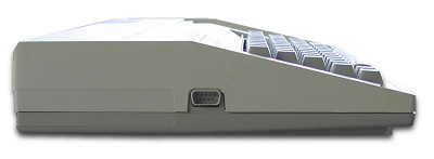 Foto eines Texas Instruments TI-99/4A (beige Version, links)